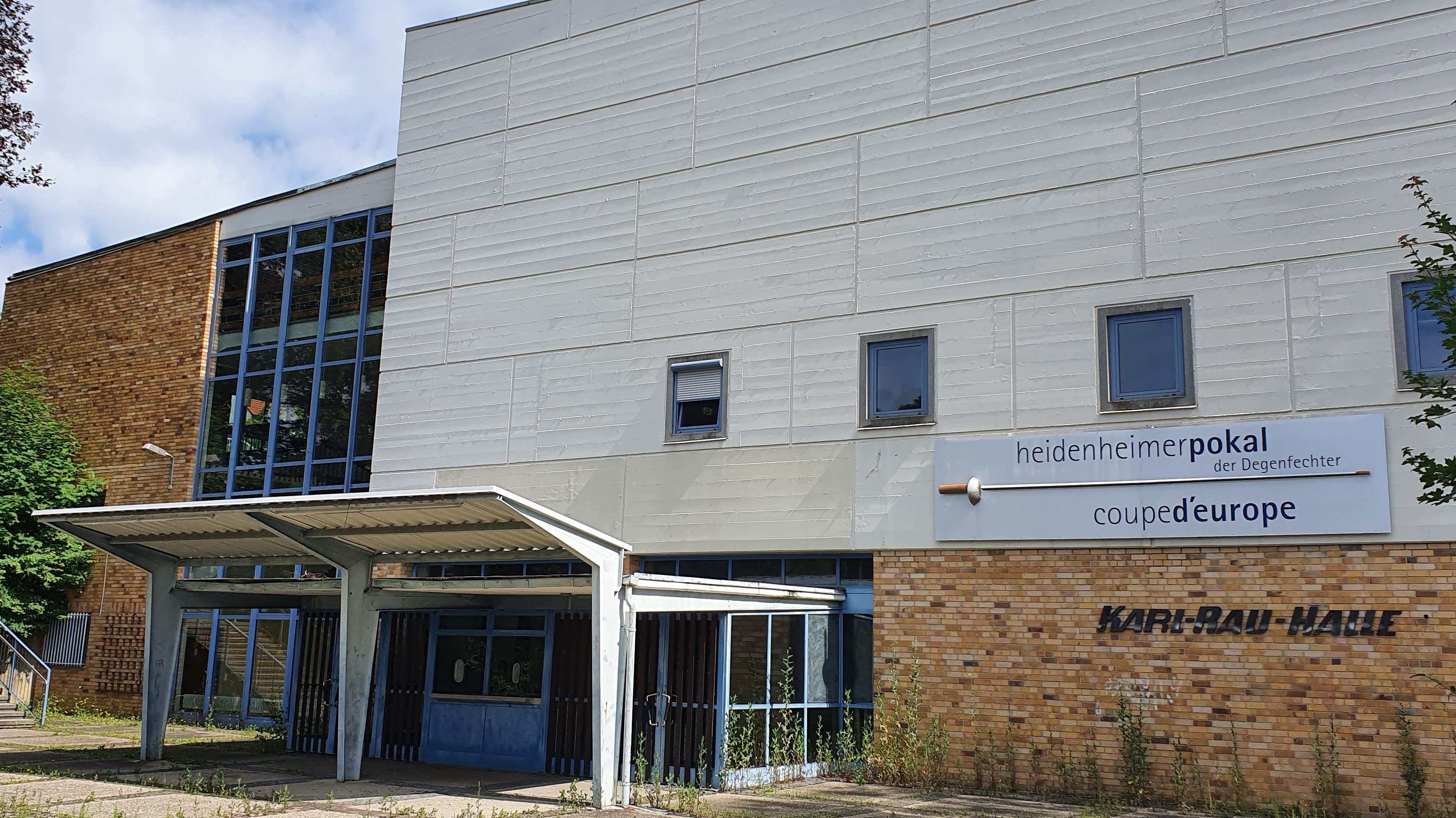 Eingangsbereich der Karl-Rau-Halle in Heidenheim, dem Zentrum der Heidenheimer Fechtertage